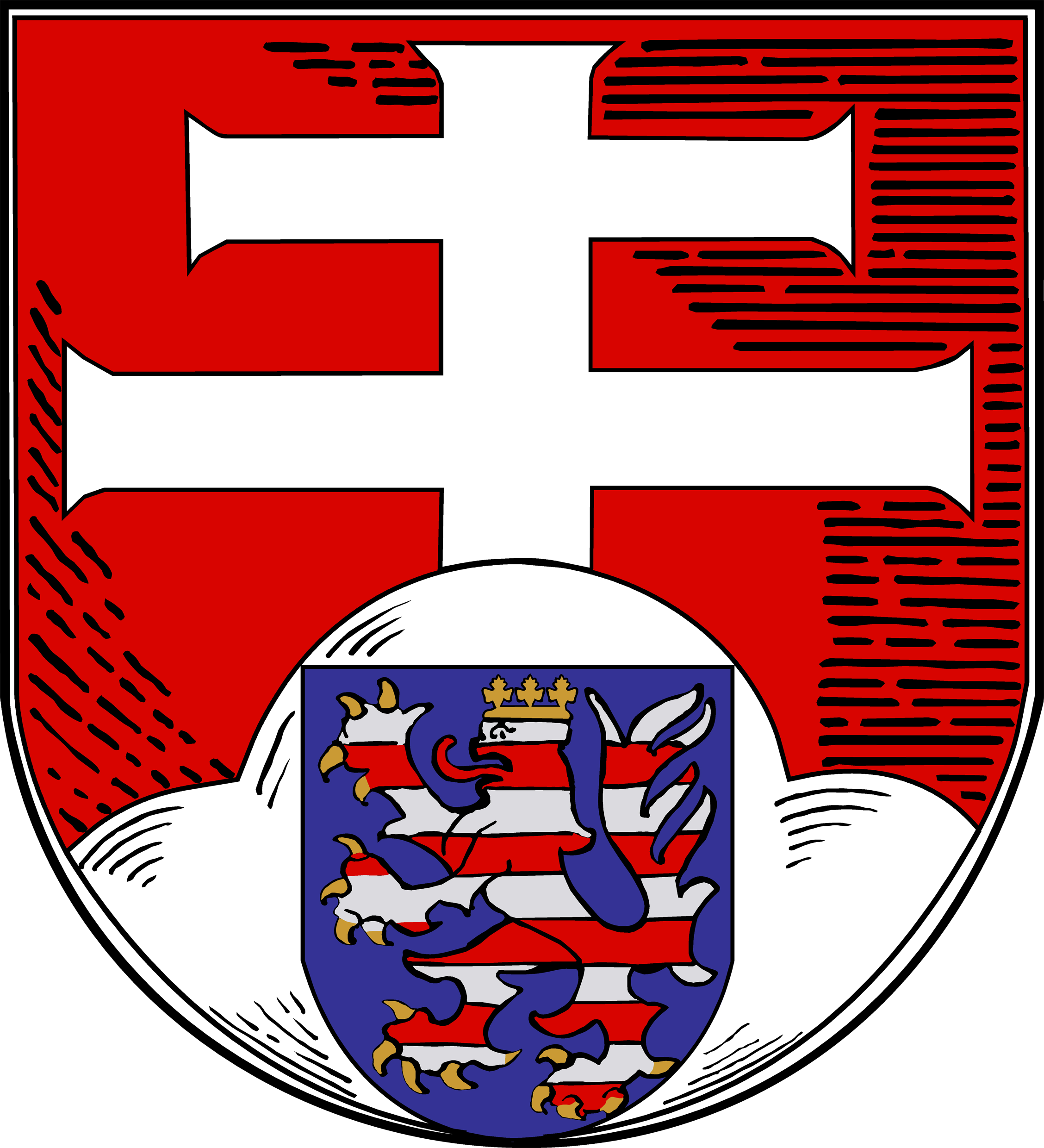 Wappen der Marktgemeinde Philippsthal (Werra)